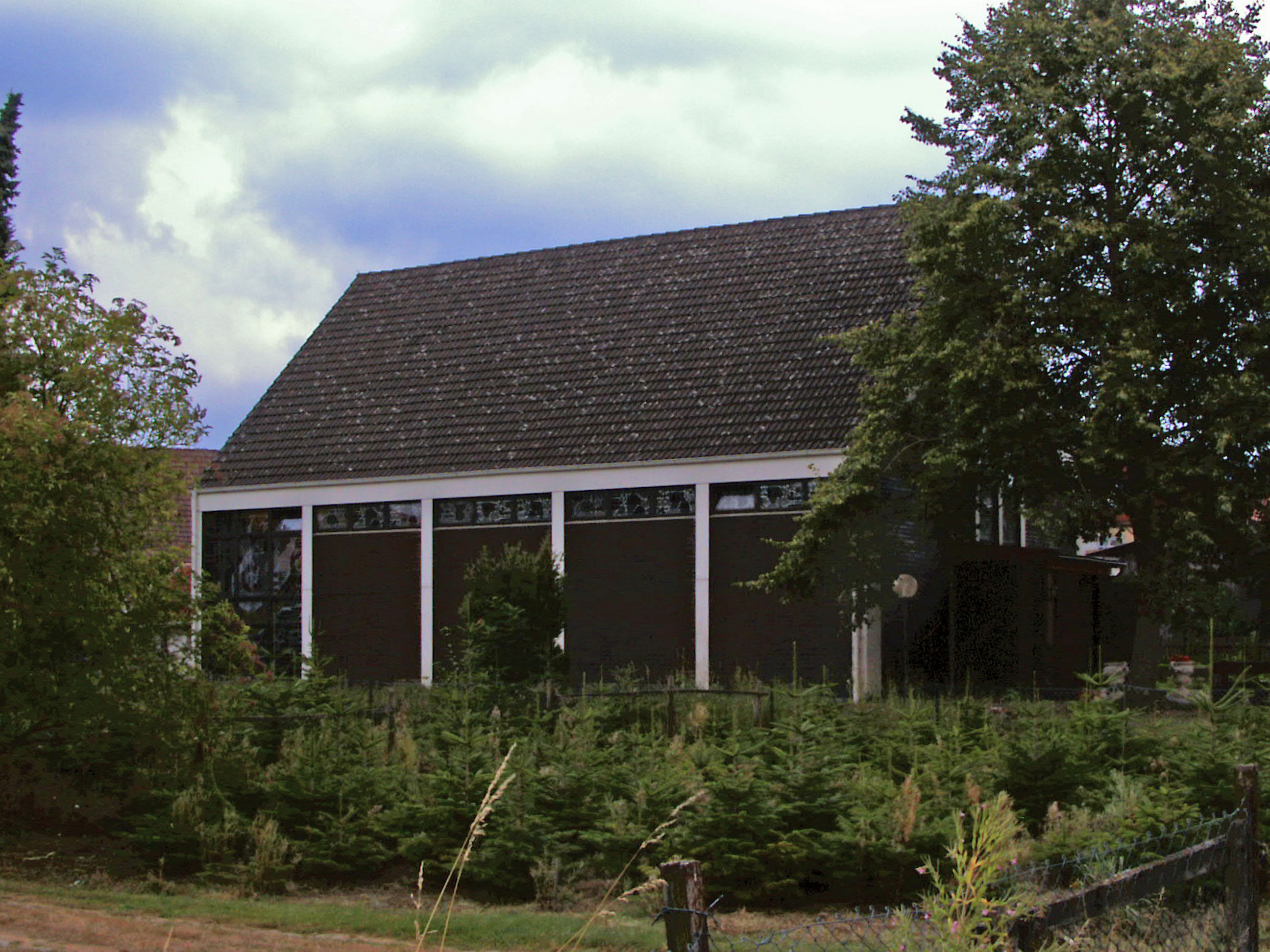 Ehemalige katholische Kirche "Hl. Familie" in Münchehof, Ortsteil von Seesen am Harz.